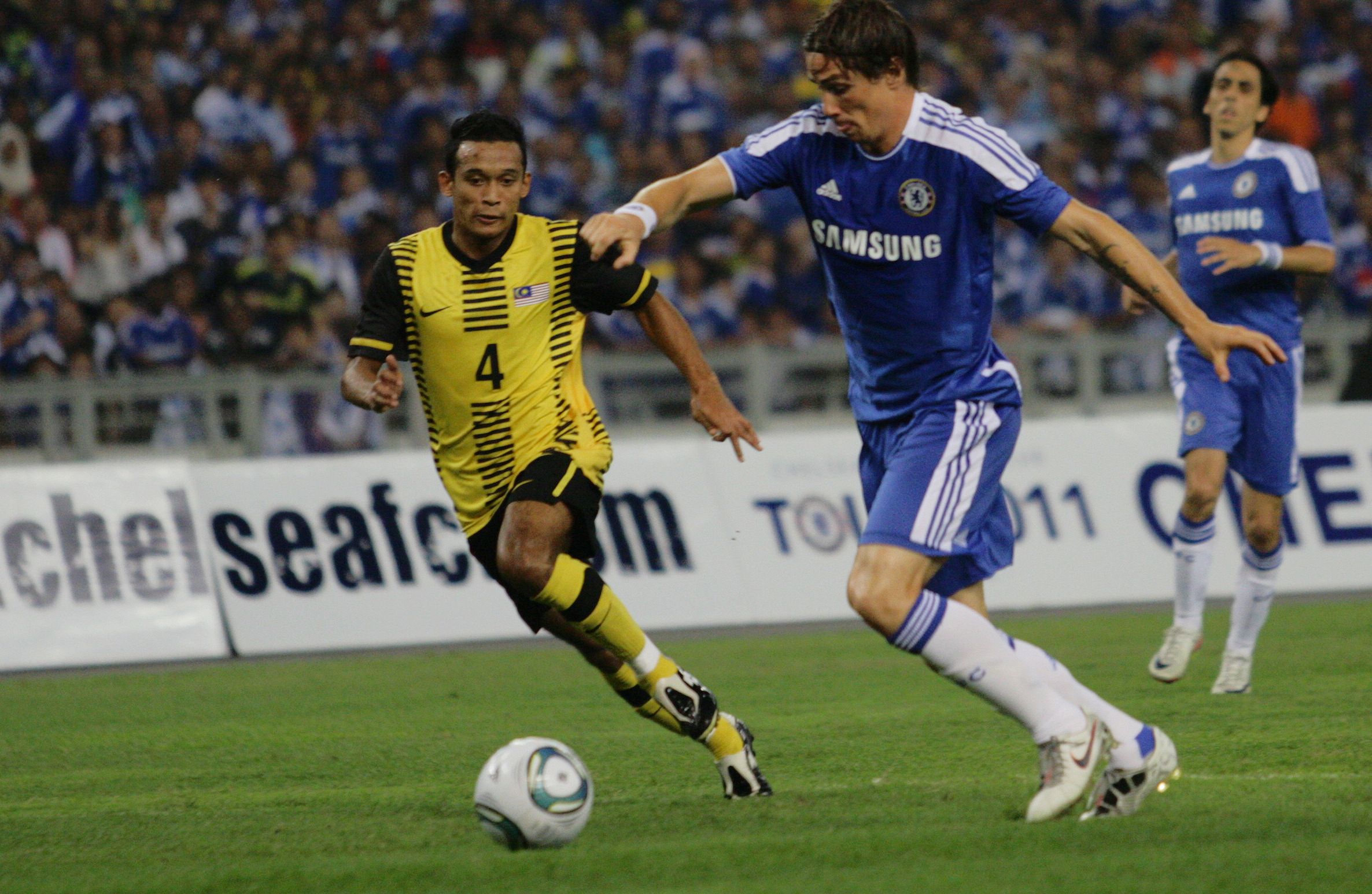 MALAYSIA VS CHELSEA 2011